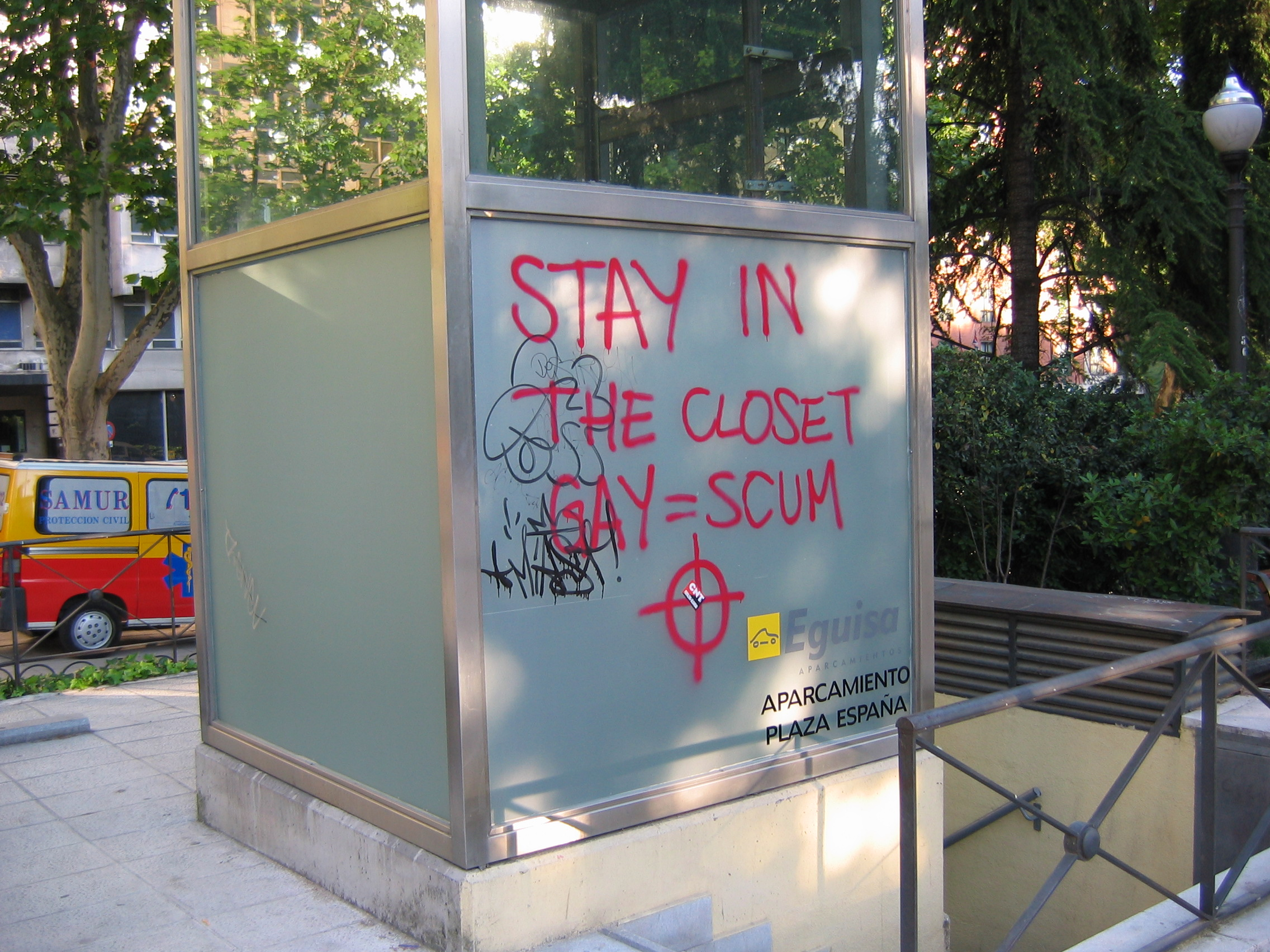 Madrido - Durante el Europride 2007 - Pintada homófoba: "Stay in the closet / Gay = Scum"